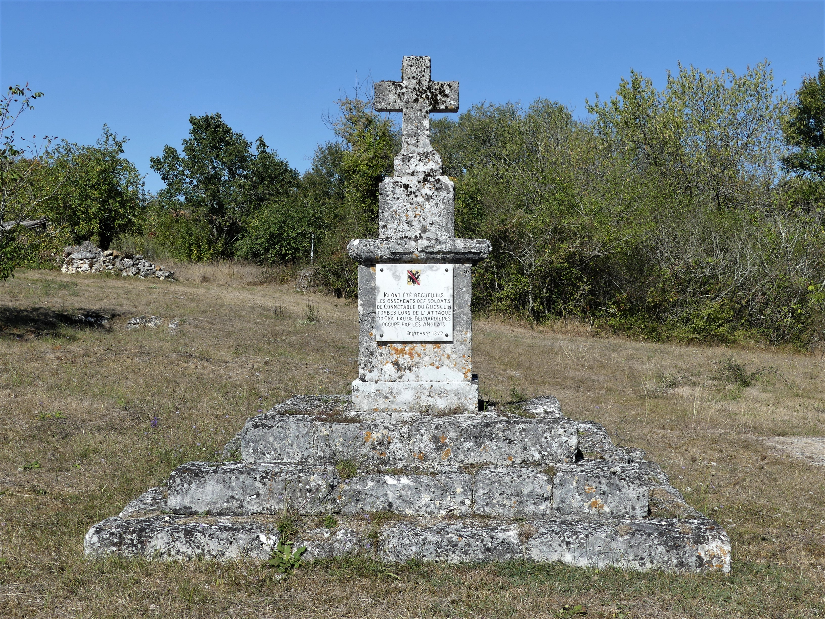 La stèle des Bernardières, Champeaux-et-la-Chapelle-Pommier, commune de Mareuil en Périgord, Dordogne, France.